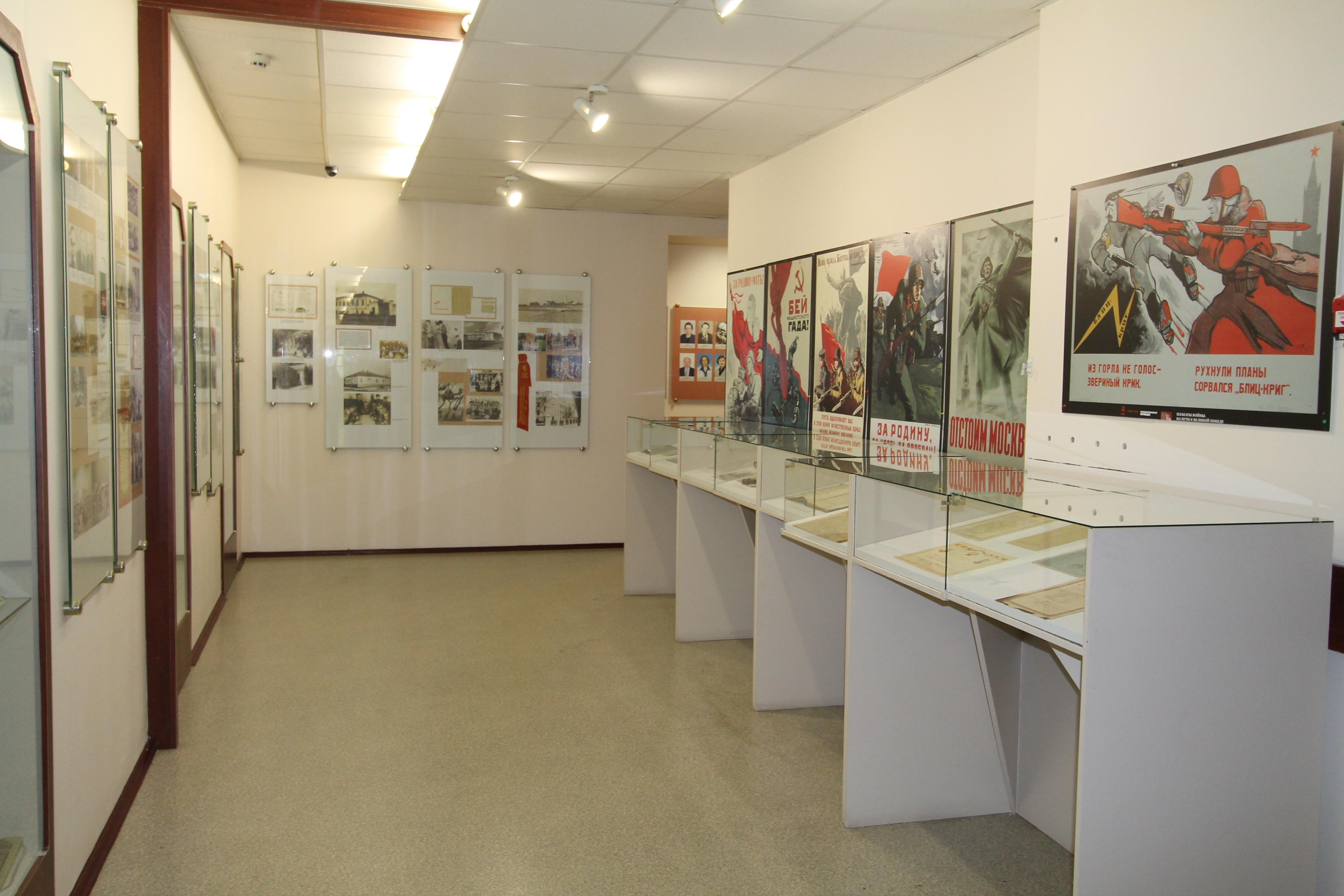 Экспозиция